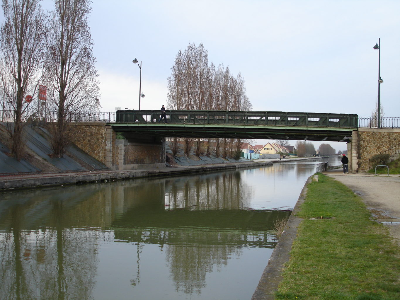 Les Pavillons-sous-Bois (France) - Le pont de l'Europe sur le Canal de l'Ourcq - mars 2007 Photo personnelle (own work) de clicsouris